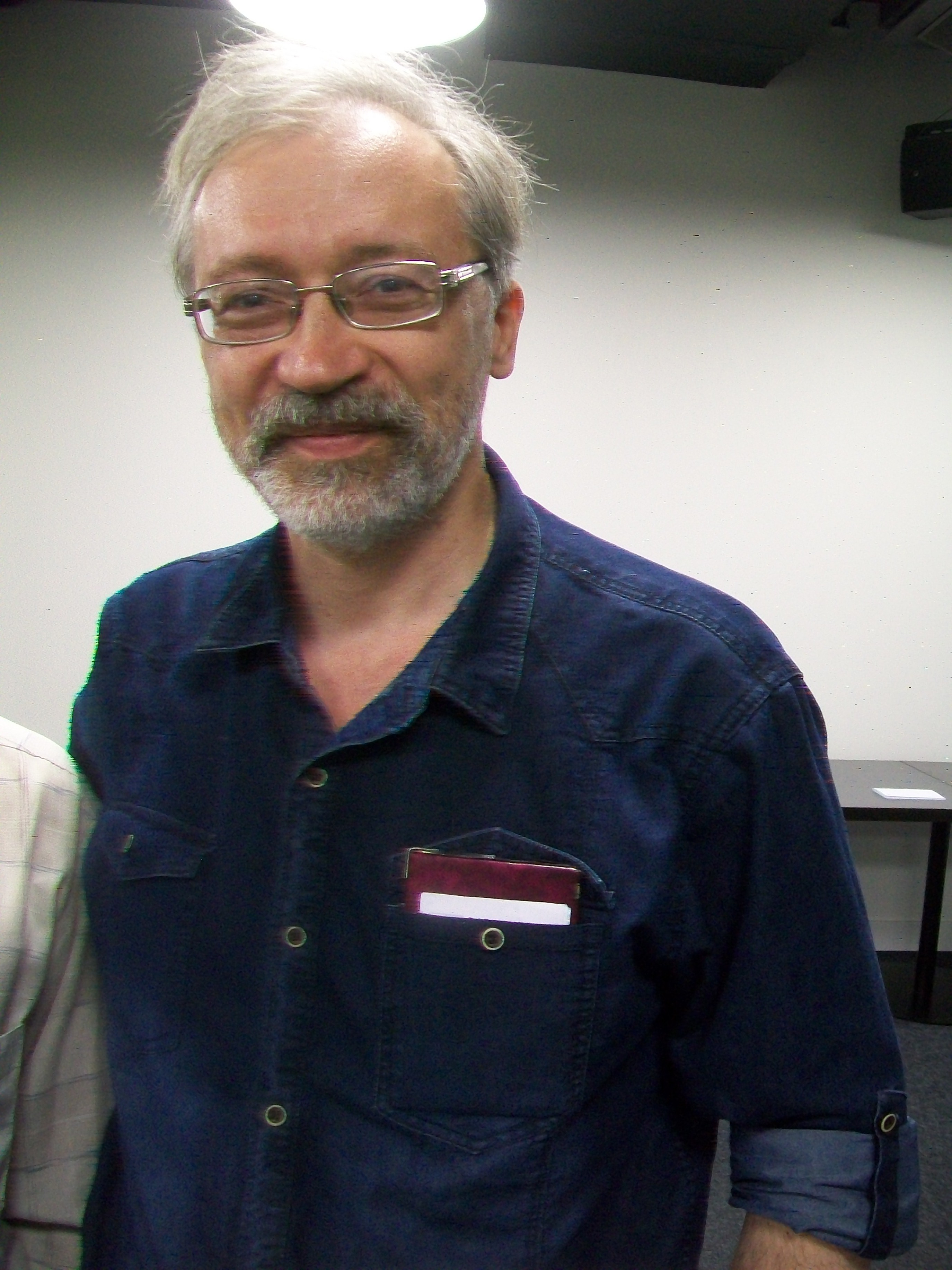 Максим Мошков в Ельцин-центре после диалога с Валерием Выжутовичем. 30 июня 2018 года